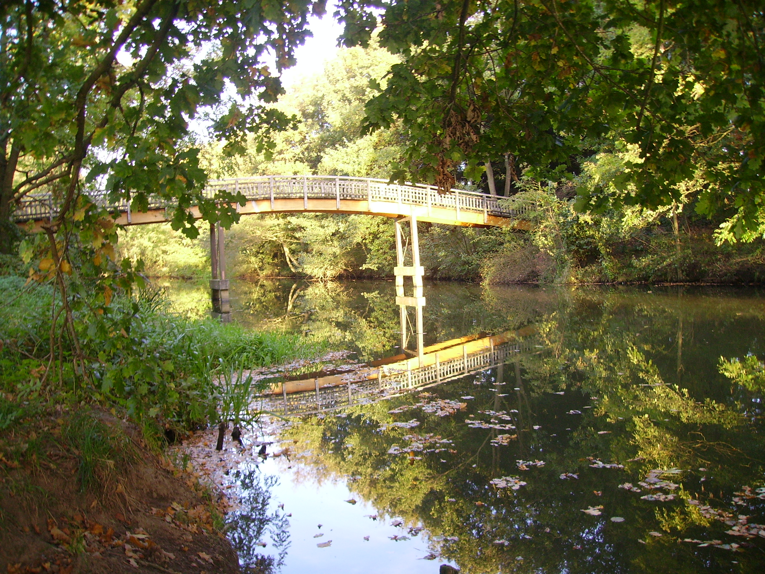 Neetzebrücke bei Barum